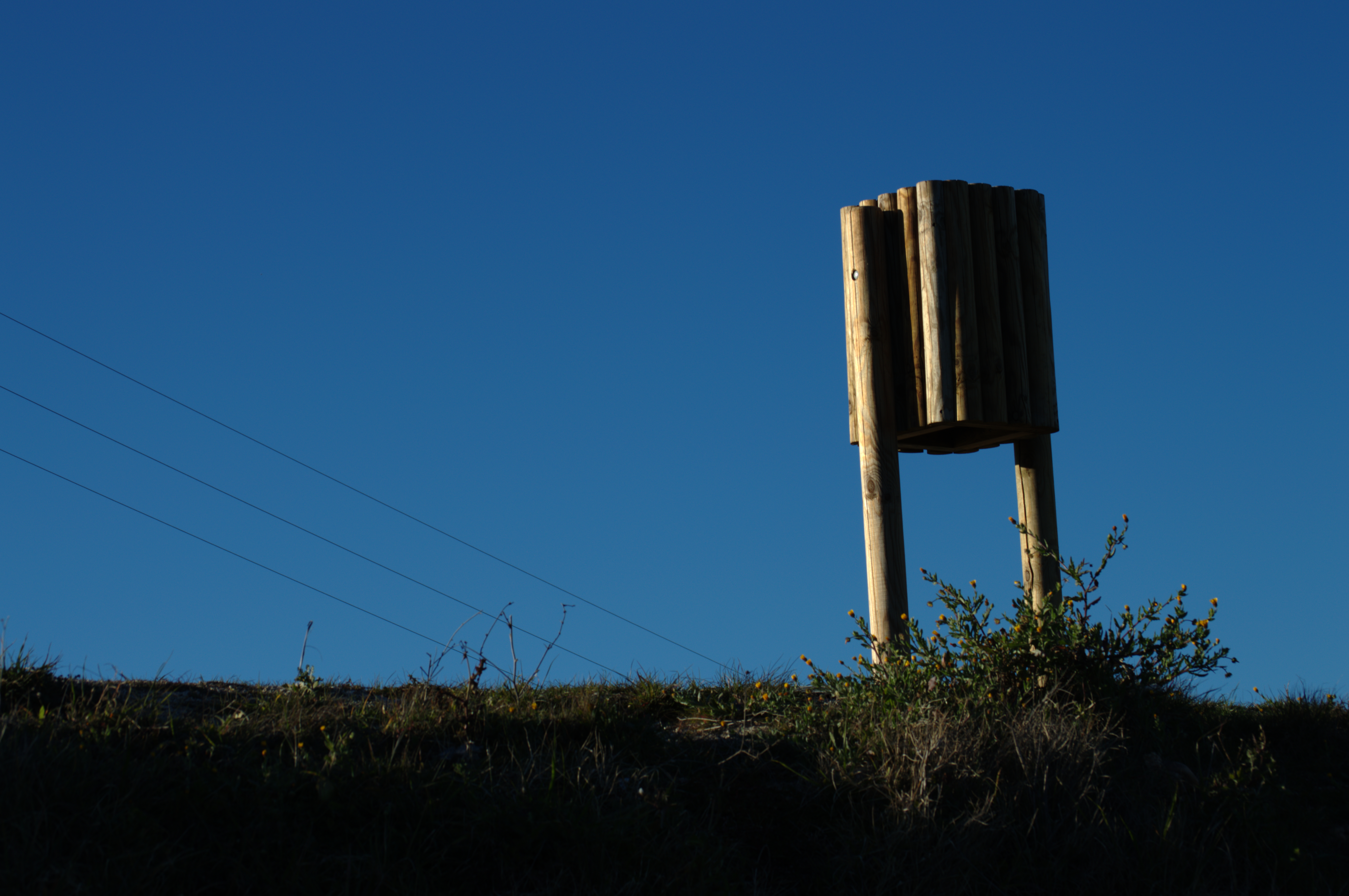 Papelera junto al monumento de los Mármoles en el pantano de Vadecañas - Cáceres